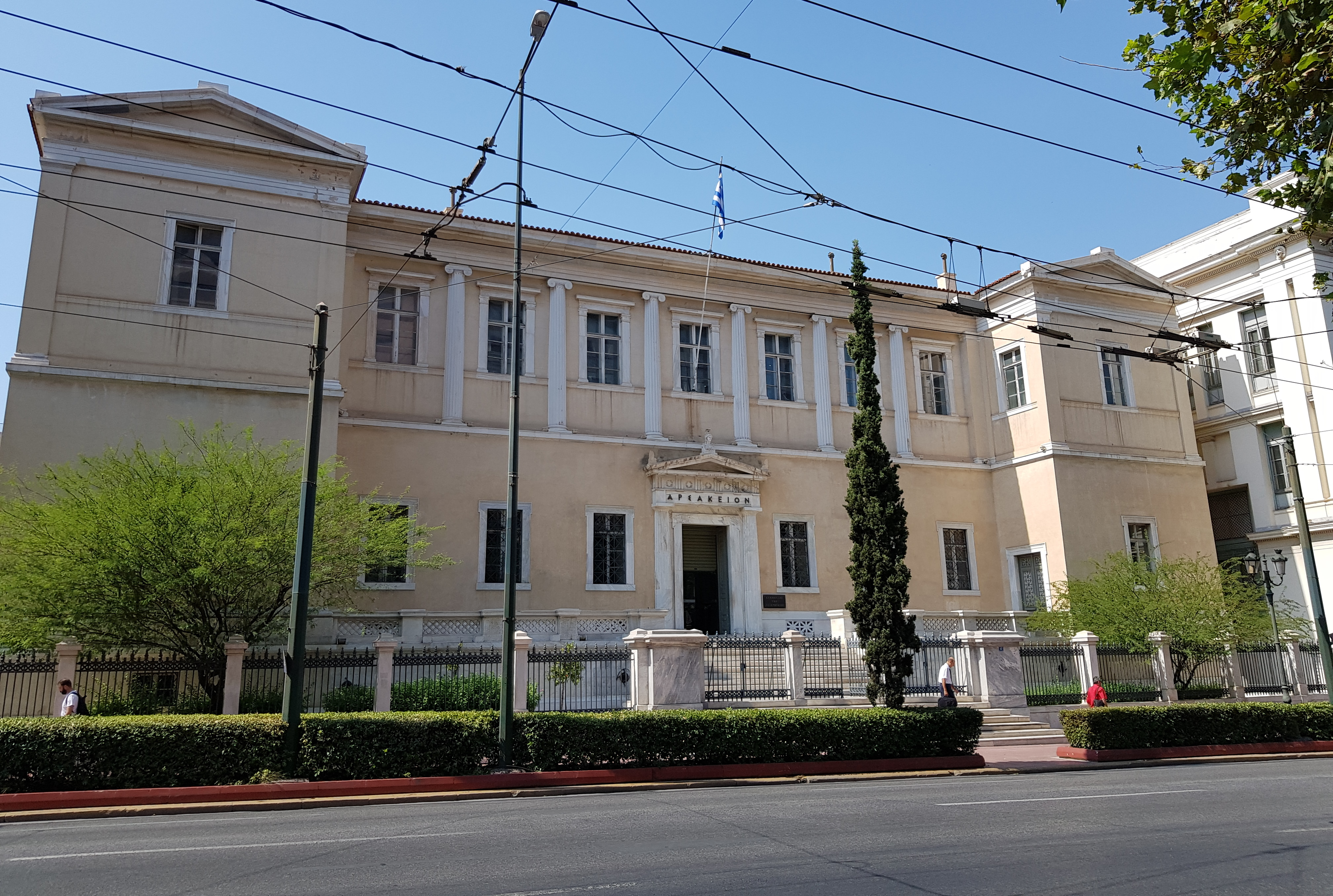 Αρσάκειο Παρθεναγωγείο«Αρσάκειο Παρθεναγωγείο»